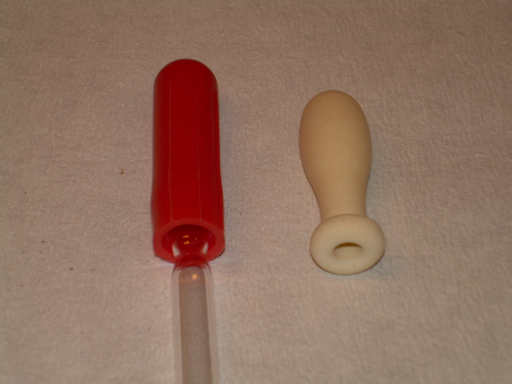 Pipette fillers